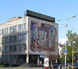 Академия наук Республики Башкортостан